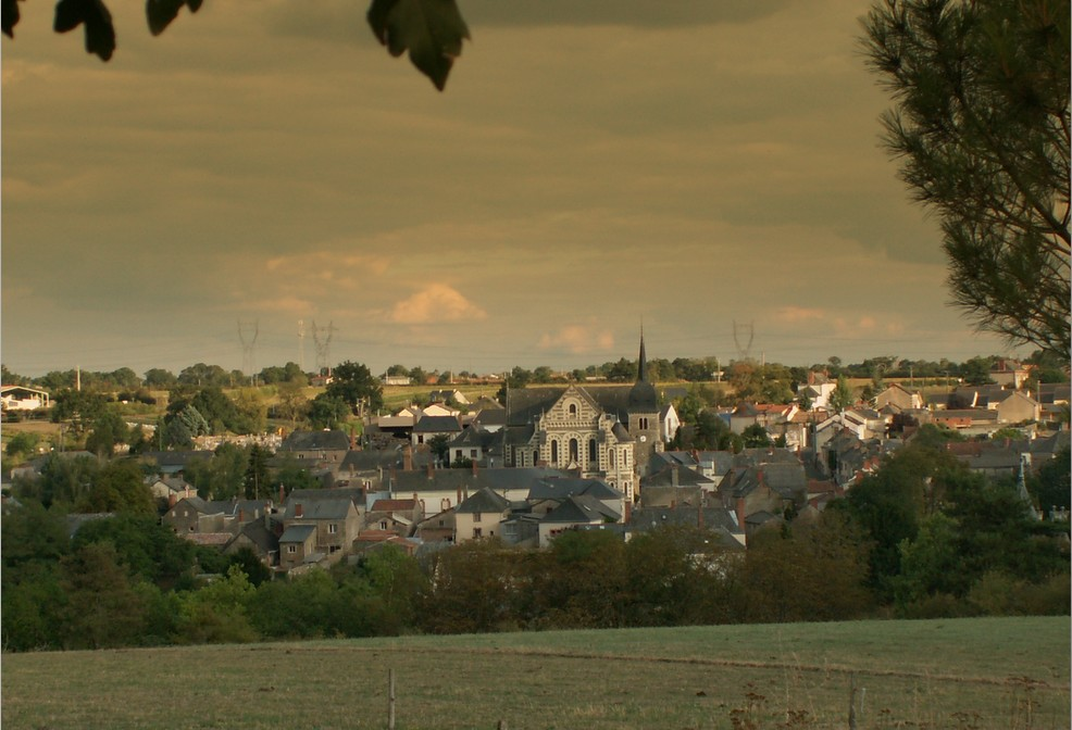 Panorama de la commune de Chanzeaux (Maine-et-Loire, France) depuis la Montée.